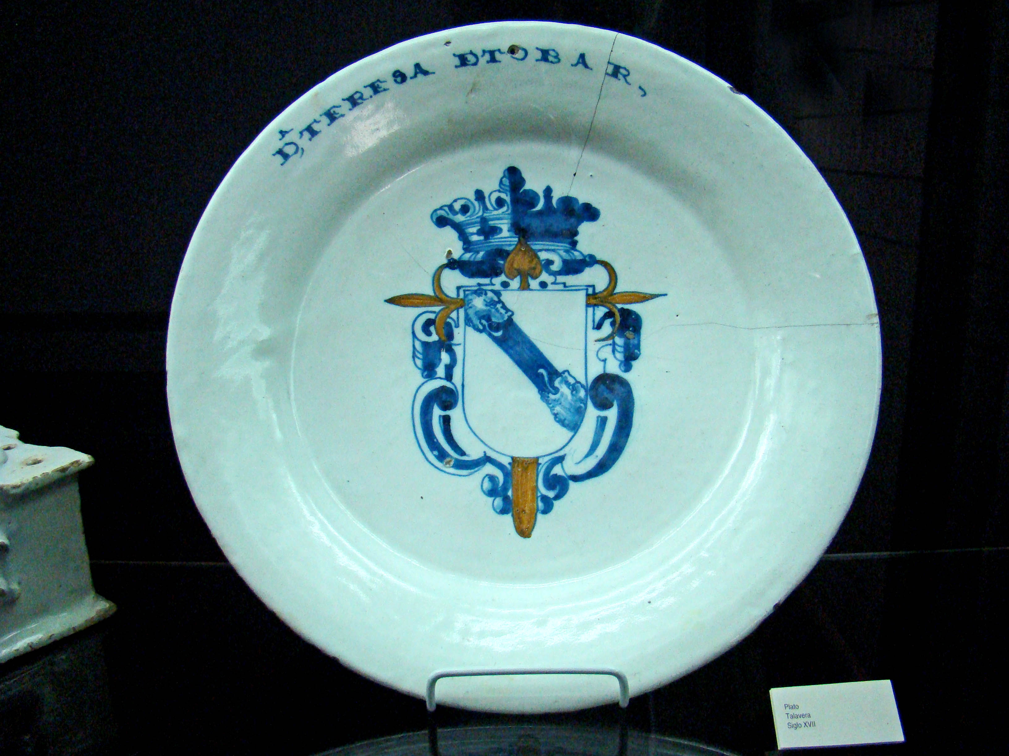 Cerámica de Talavera de la Reina en Toledo (España). Museo de Valladolid en el palacio de Fabio Nelli.